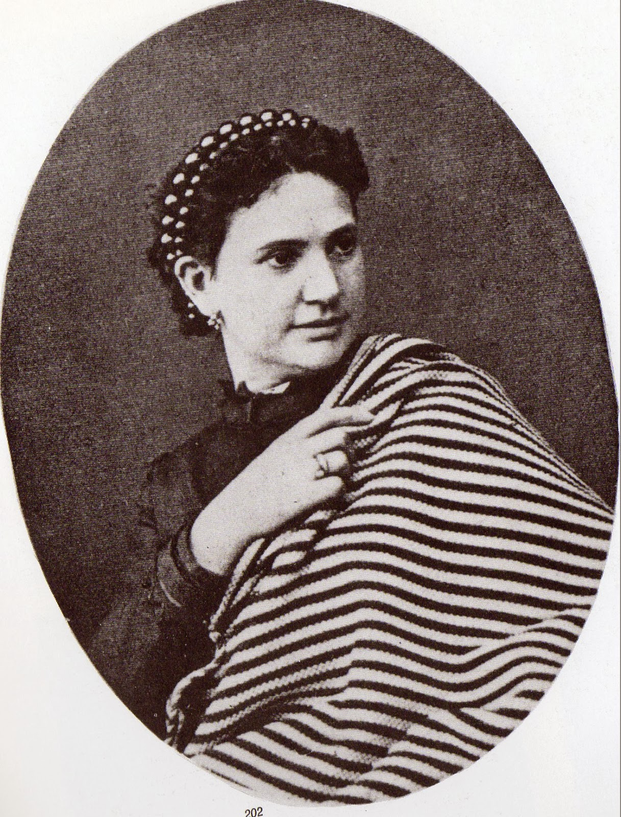 Angiolina Ortolani (1834-1913)